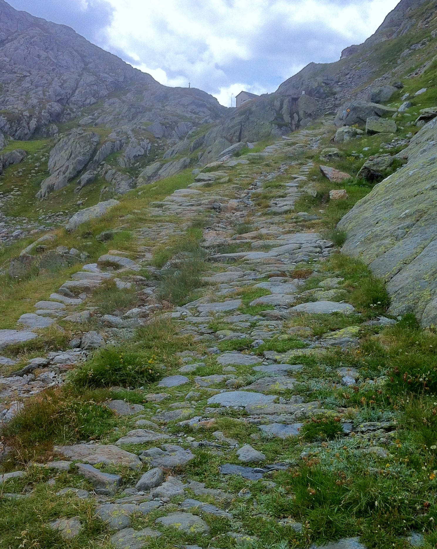 La Vía Francígena cerca del Gr St Bernard